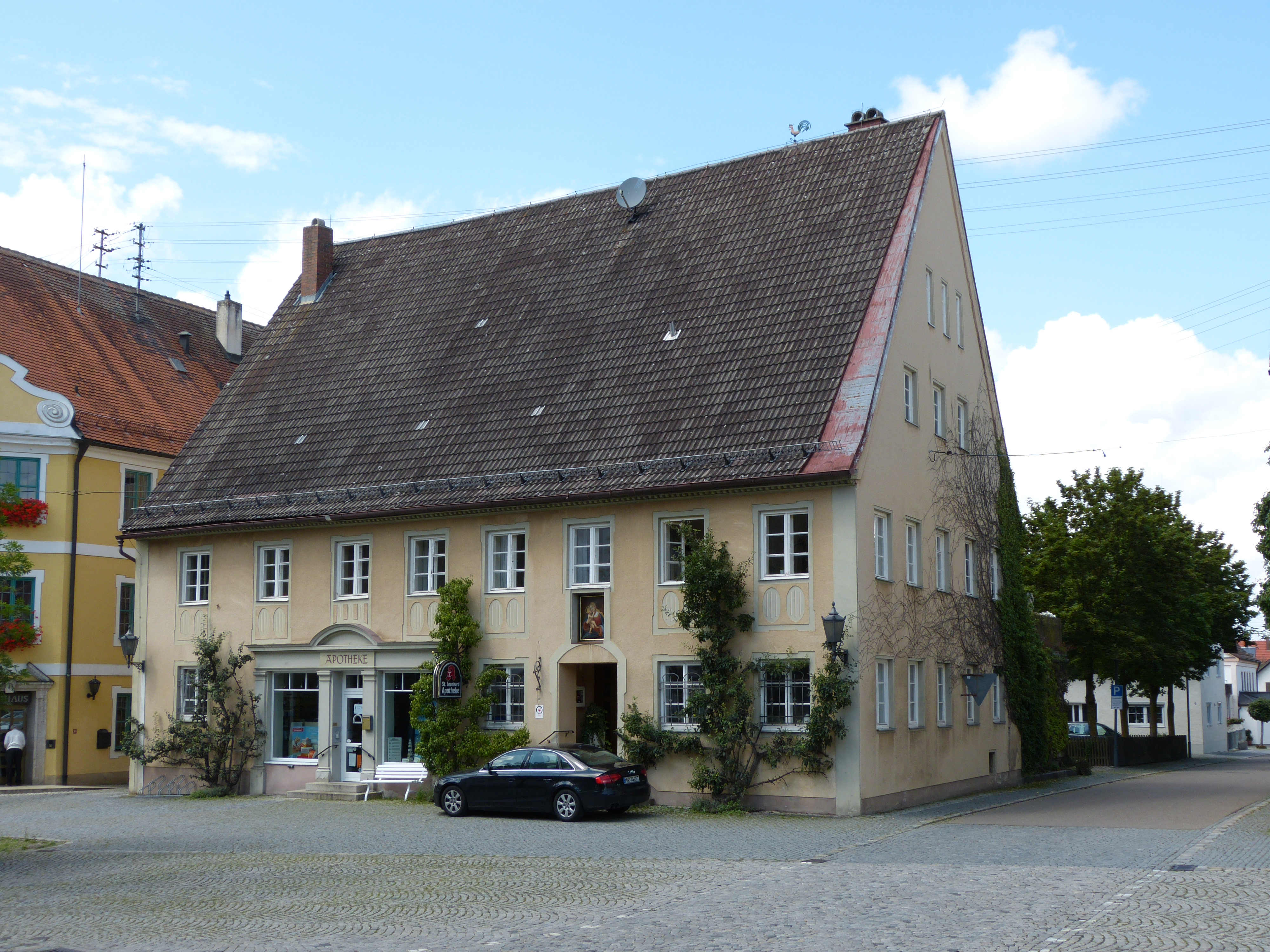 Marktplatz 5, Kirchheim in Schwaben, Landkreis Unterallgäu, Bayern